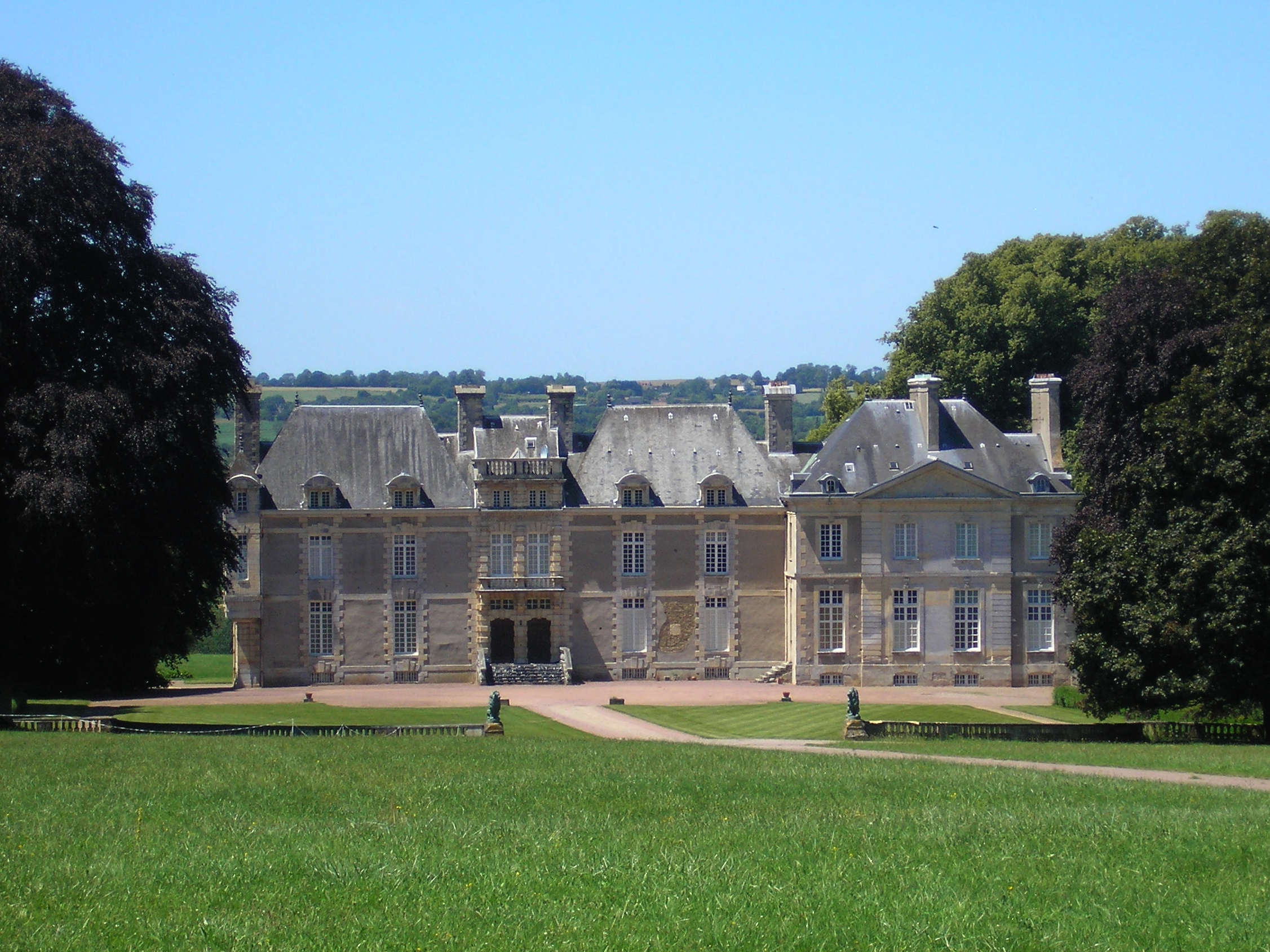 Villers-Bocage (Normandie, France). Le château.